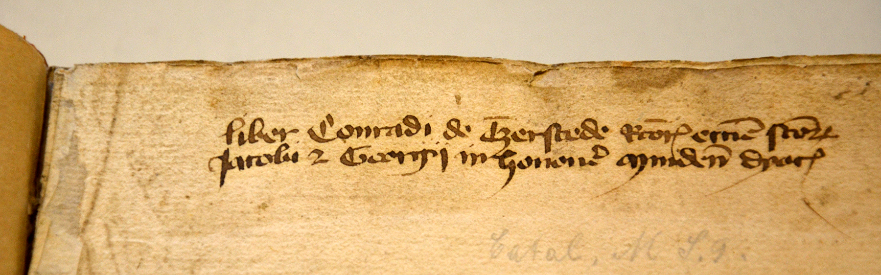 Handschriftlicher Eigentumsnachweis (Provenienz) von Konrad von Sarstedt vor der gebundenen Ausgabe der Lectura super officio missae und anderer Schriften von Heinrich von Berching ...